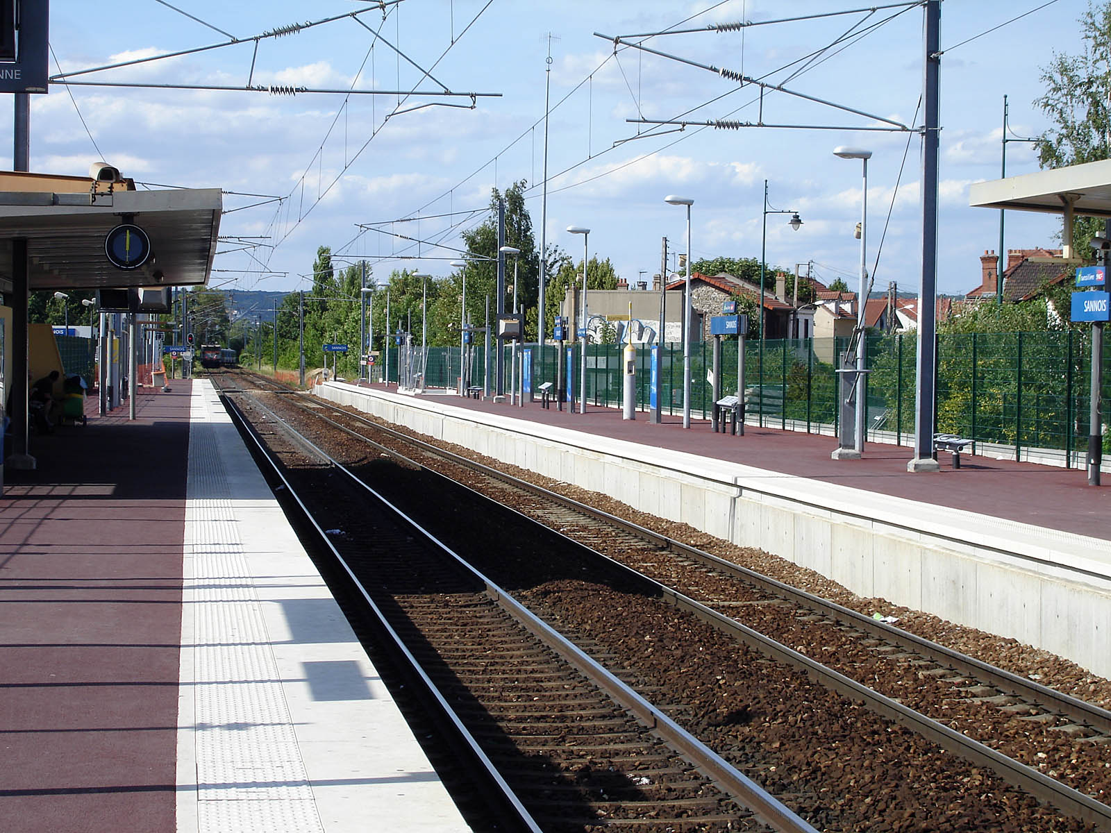 La gare de Sannois, Val-d'Oise, France.